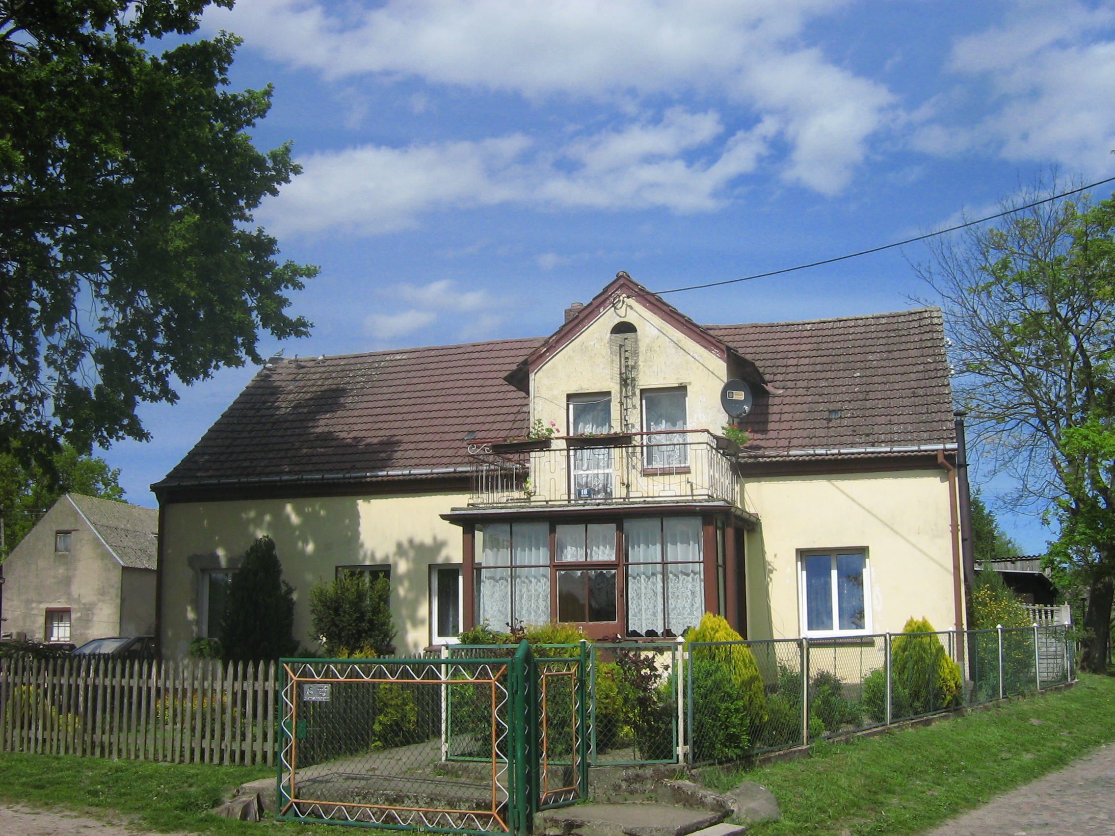 Dom we wsi